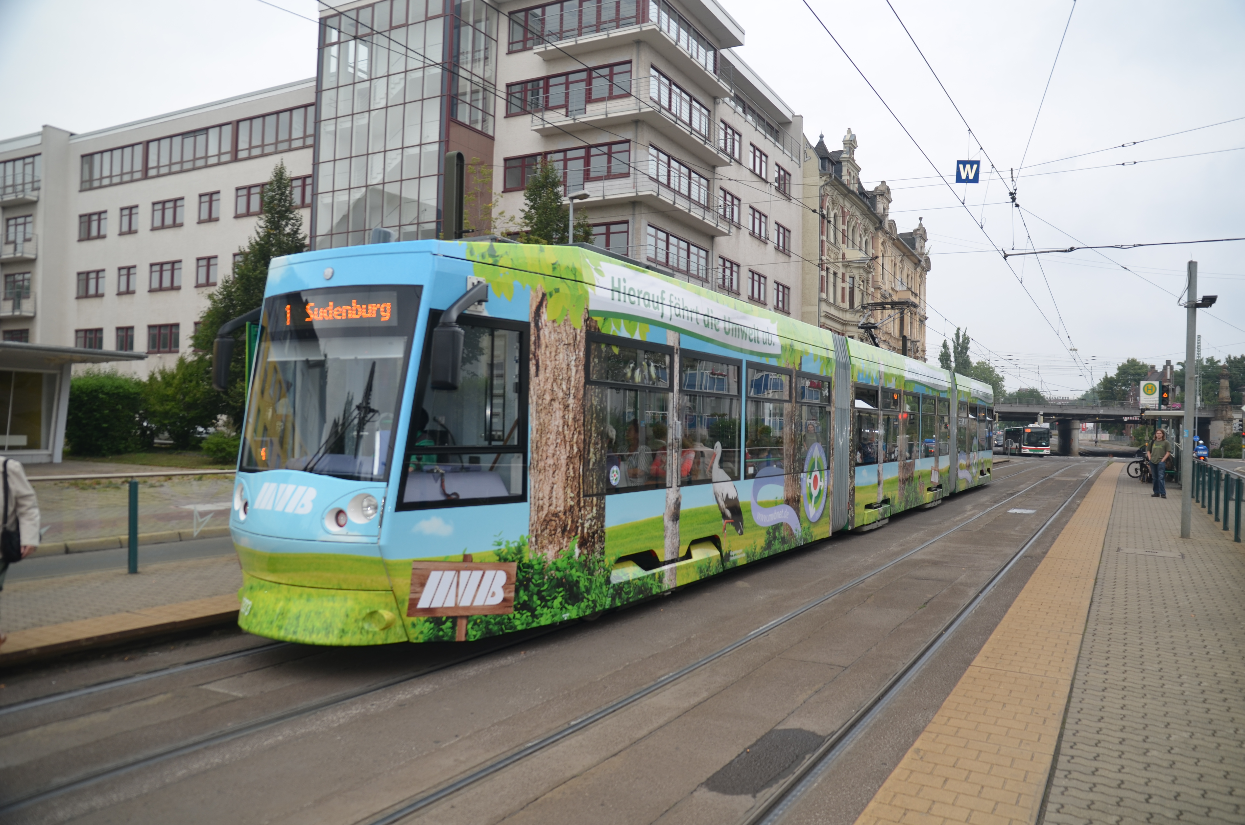 TW 1373 in Magdeburg Neustadt